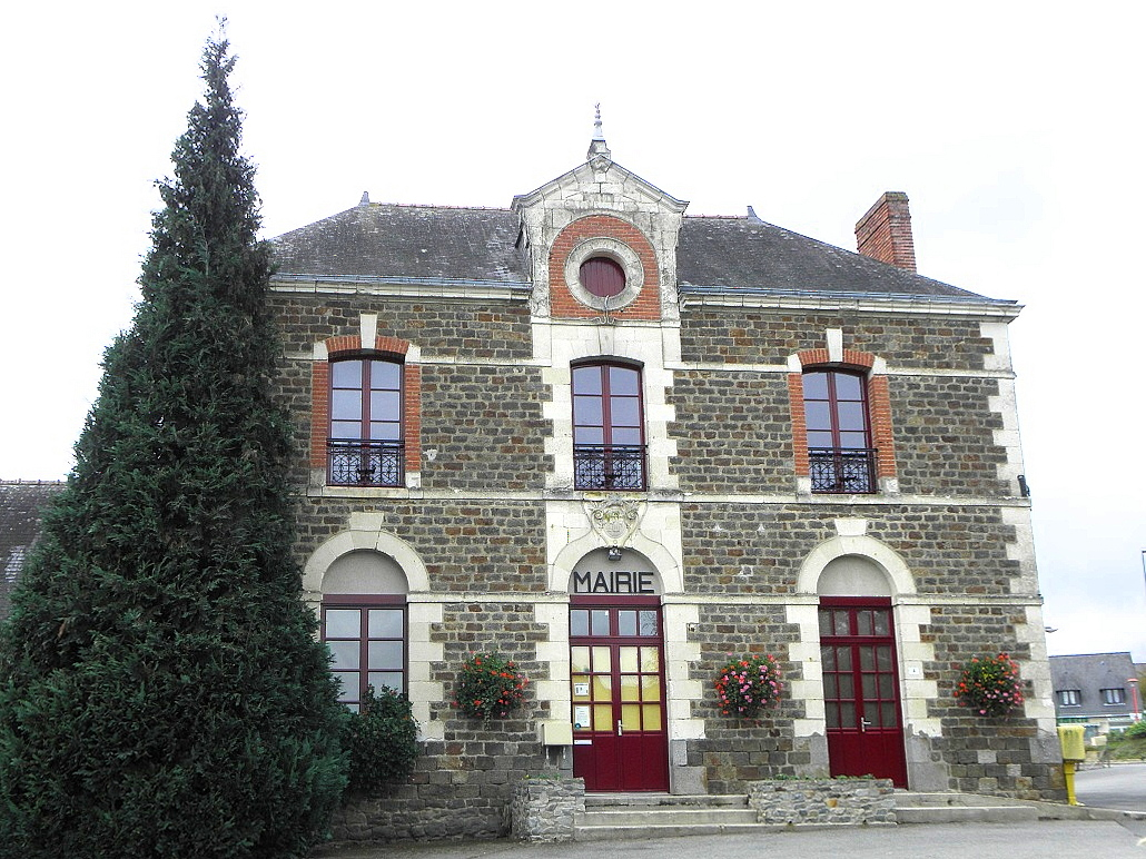 Mairie de Montreuil-le-Gast (35).